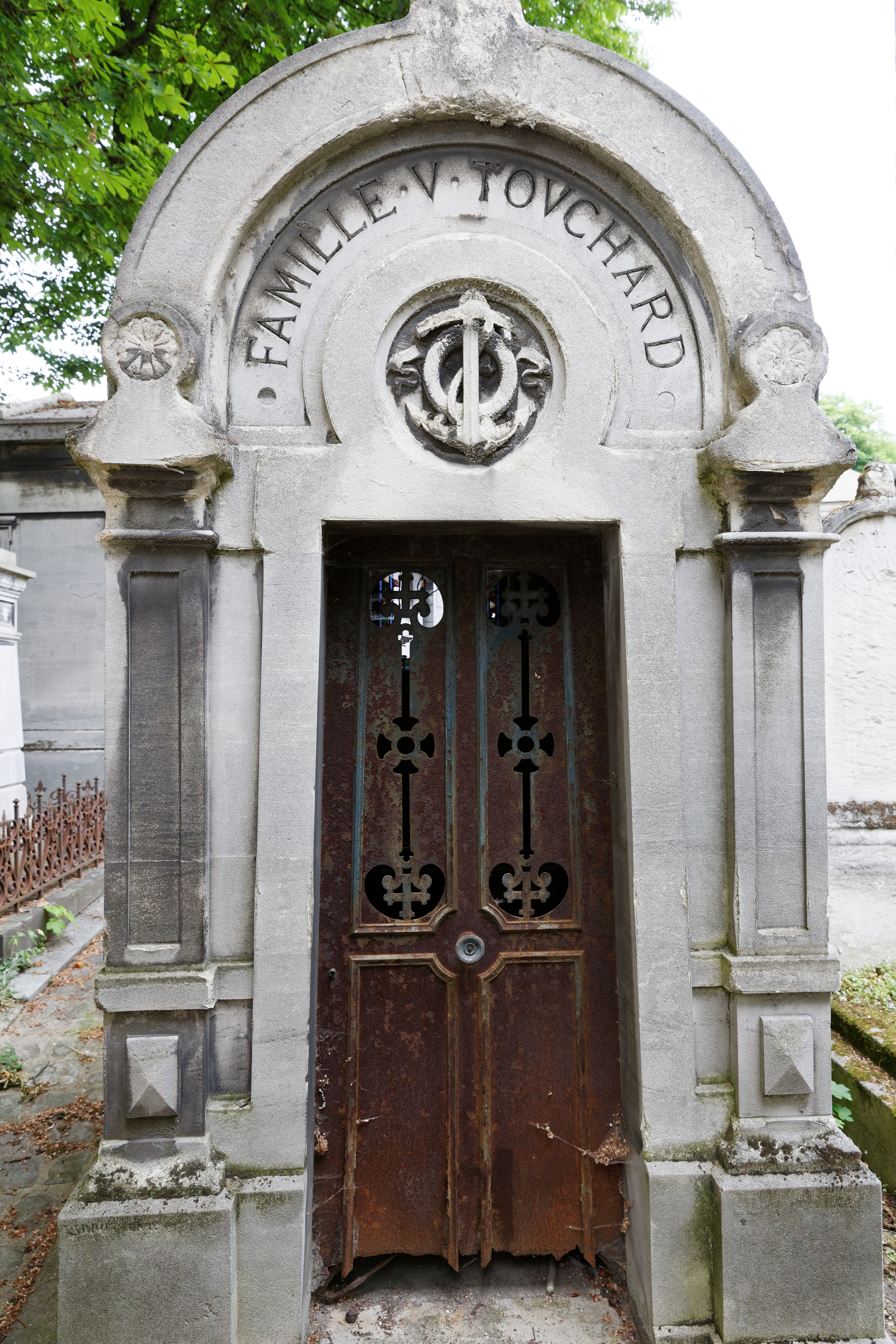 Sépulture de Philippe Touchard (1810-1879), vice-amiral, gouverneur de la Guadeloupe et député de la Seine ; Camille Touchard née Leconte (1821-1910), épouse de Philippe Touchard.